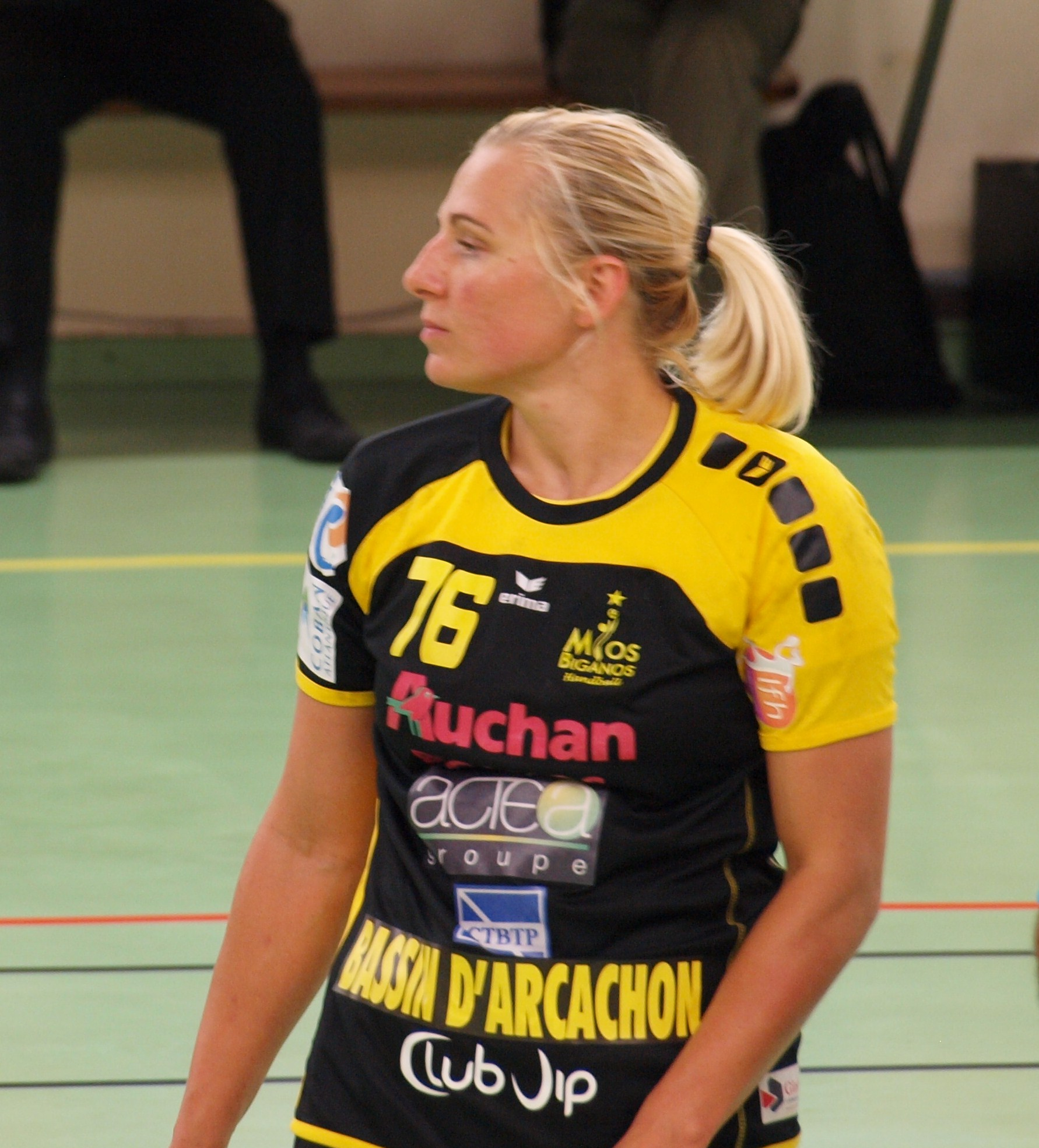 Agata Szukielowicz saison 2010-2011